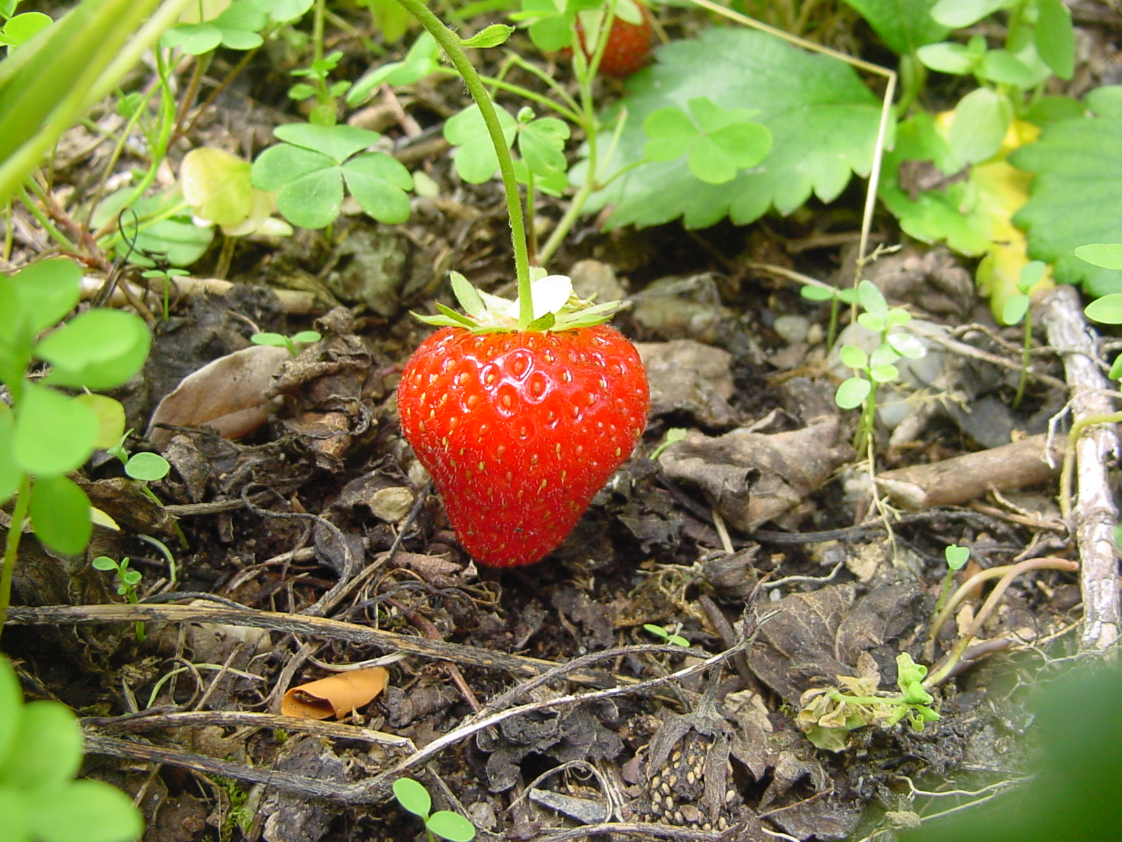 fraise du jardin